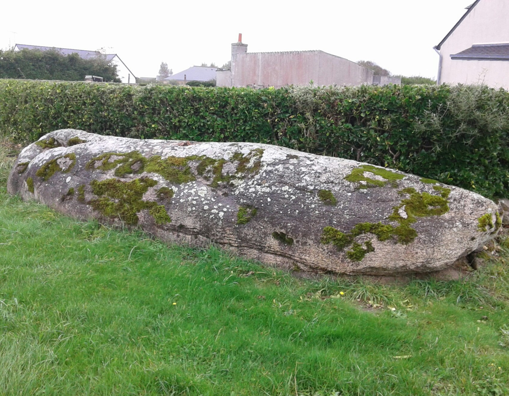 Menhir de Kervédal, Penmarc'h